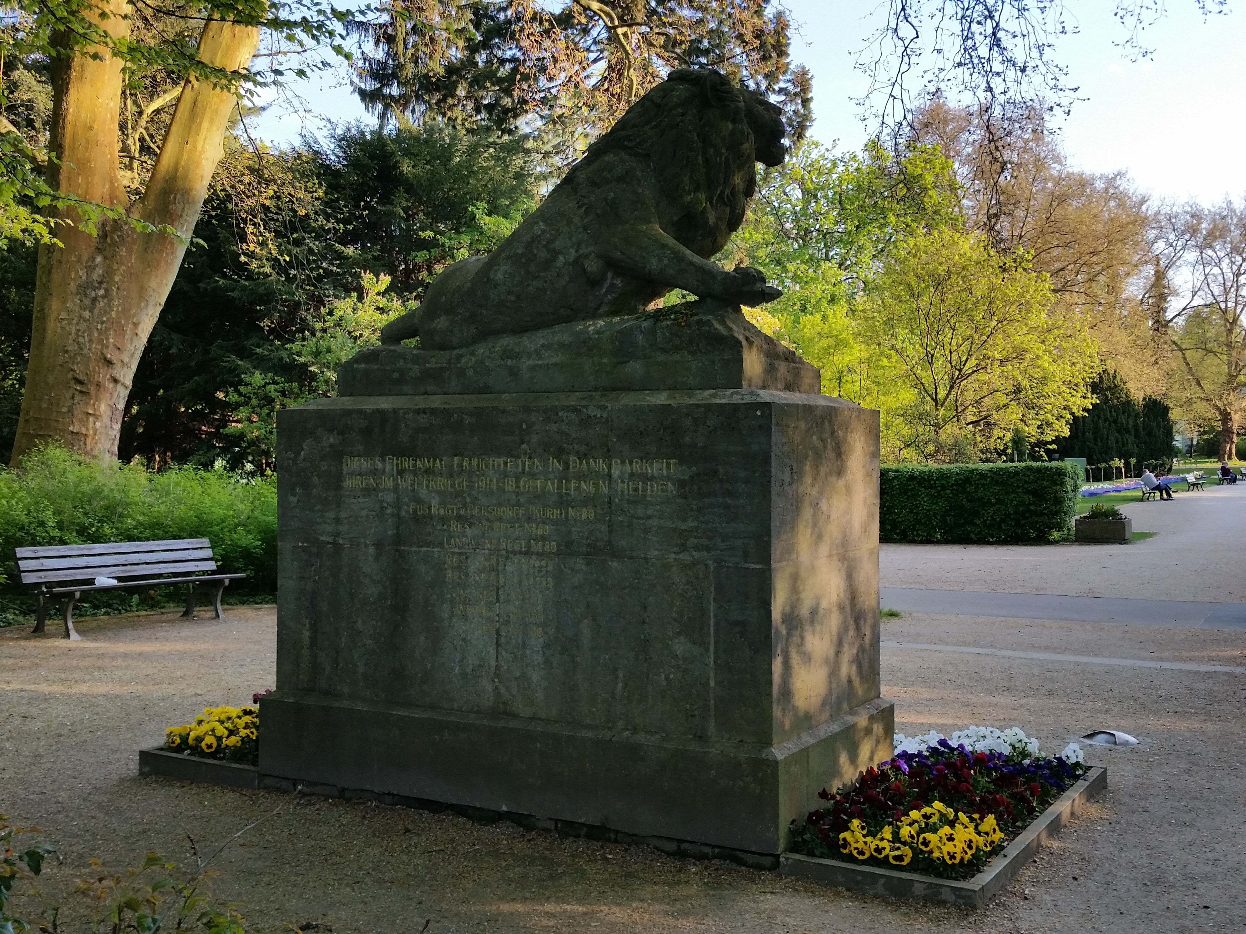 Am 22. August 1926 enthülltes Denkmal für die im 1. WK Gefallenen aus dem "Infanterie-Regiment Nr. 80"